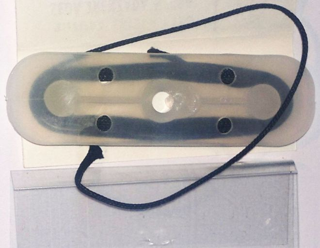 Fil de seda negra trenada del nº 3 dins el seu estoig esteril